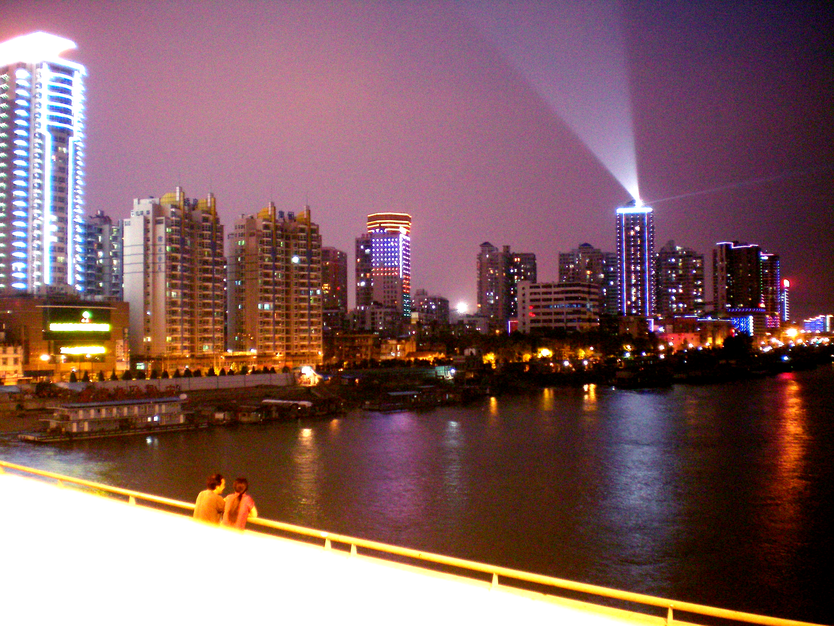 汉口